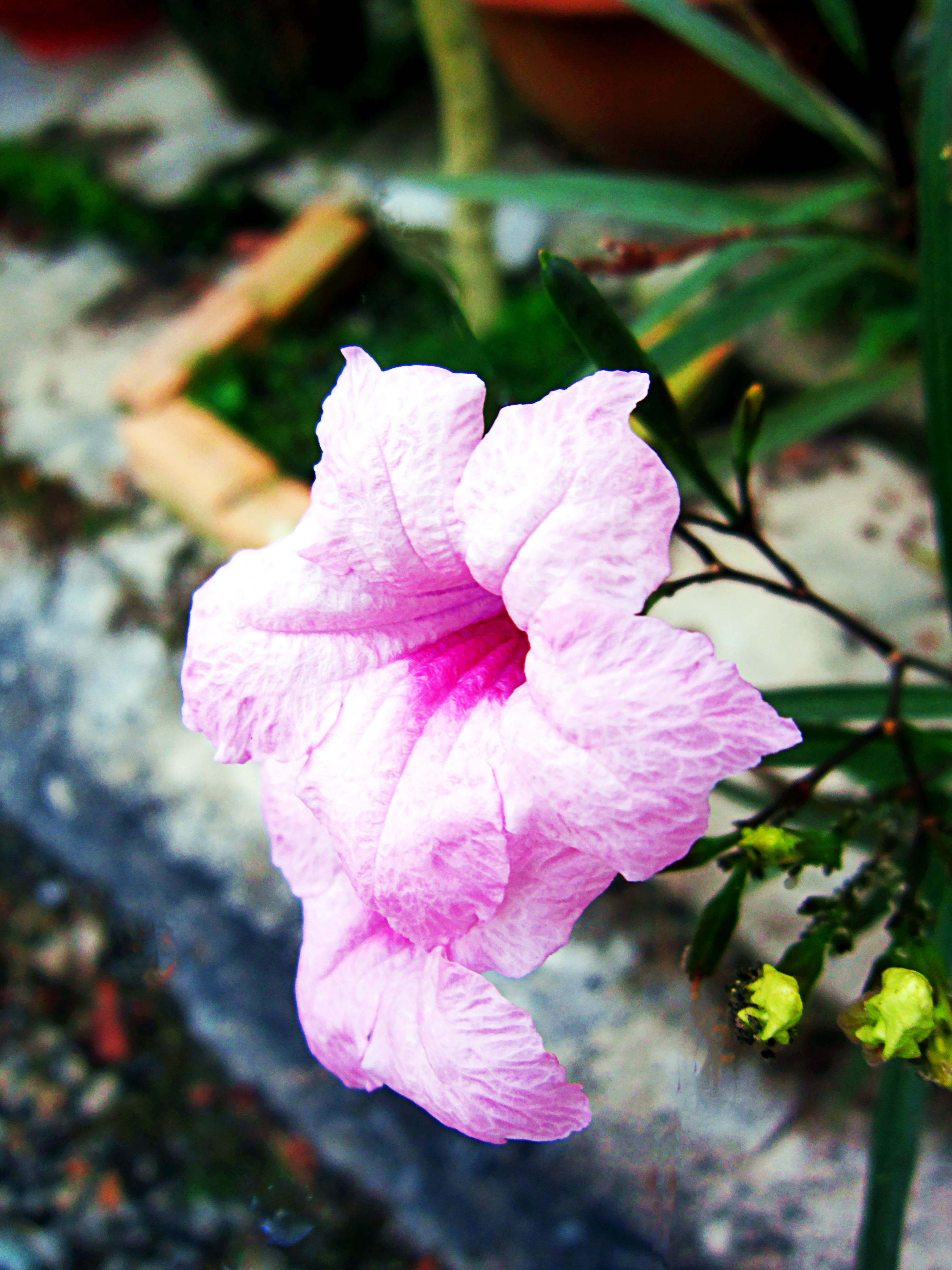 Hoa nổ thân cao (english: Mexican Bluebell), loại có màu tím nhạt. Ảnh chụp ở Long Xuyên (Việt Nam).